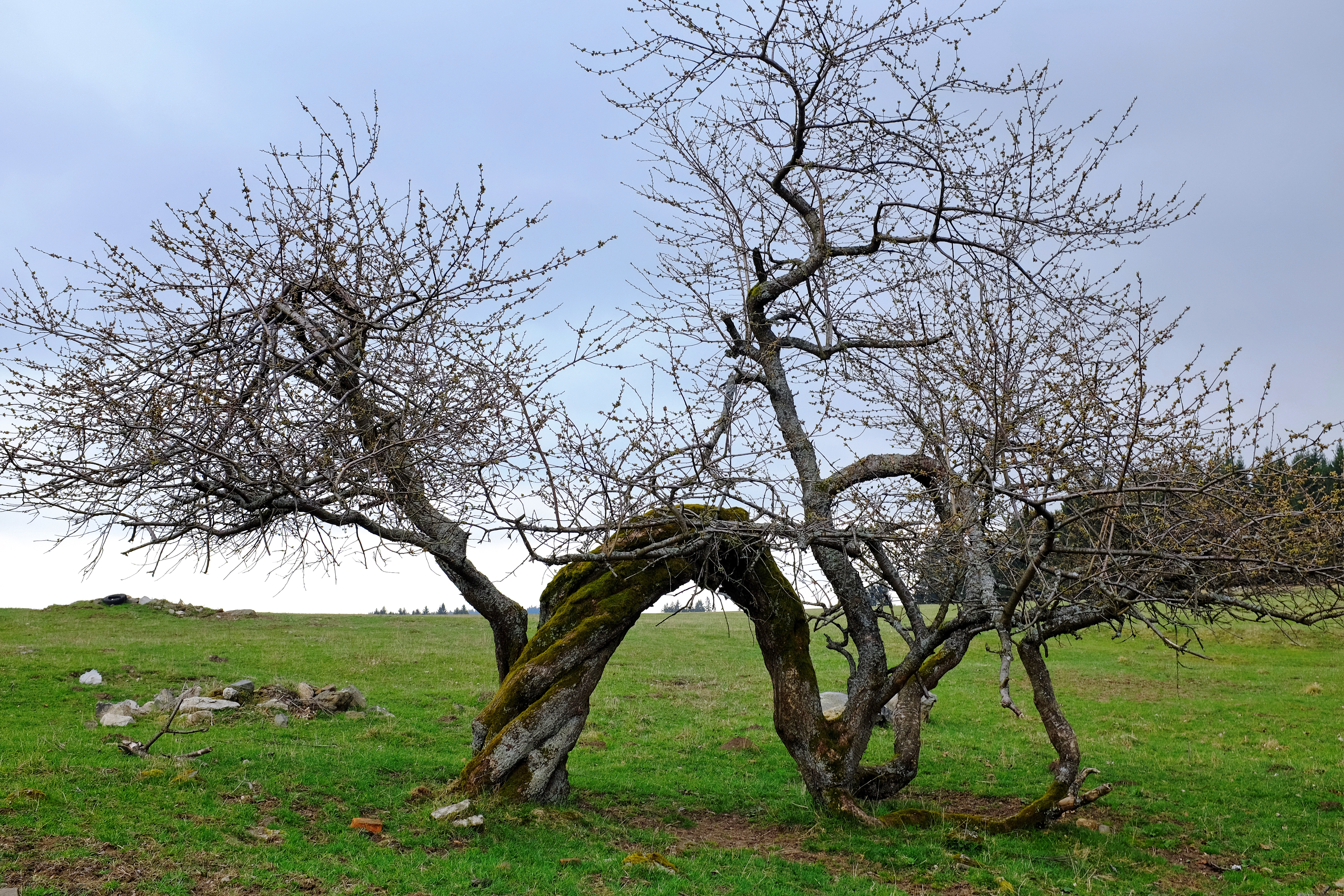 Památný strom - Třešeň na Žitné - zaniklá Horní Žitná, Březová, Slavkovský les, okres Sokolov